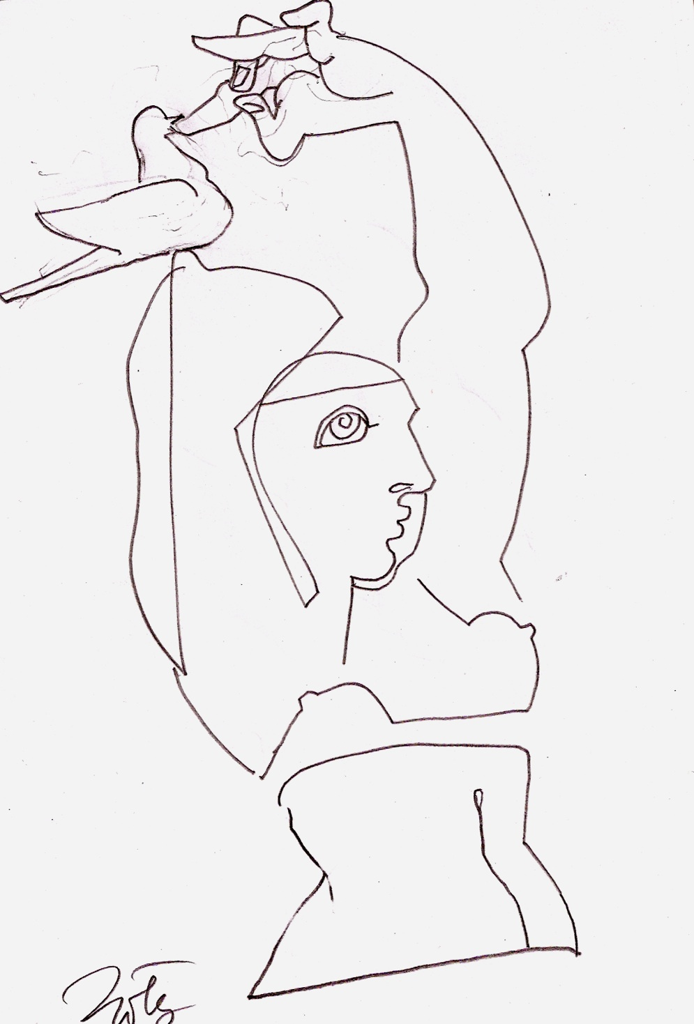 Dessin de Piotr Szmitke